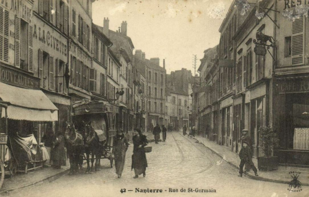 Nanterre.Rue Saint-Germain.Fiacre